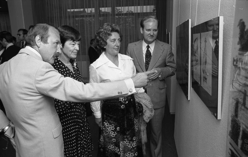 Frau Hannelore Schmidt eröffnet die Ausstellung "Berliner Atmosphäre" in der Landesvertretung Berlin, Bonn